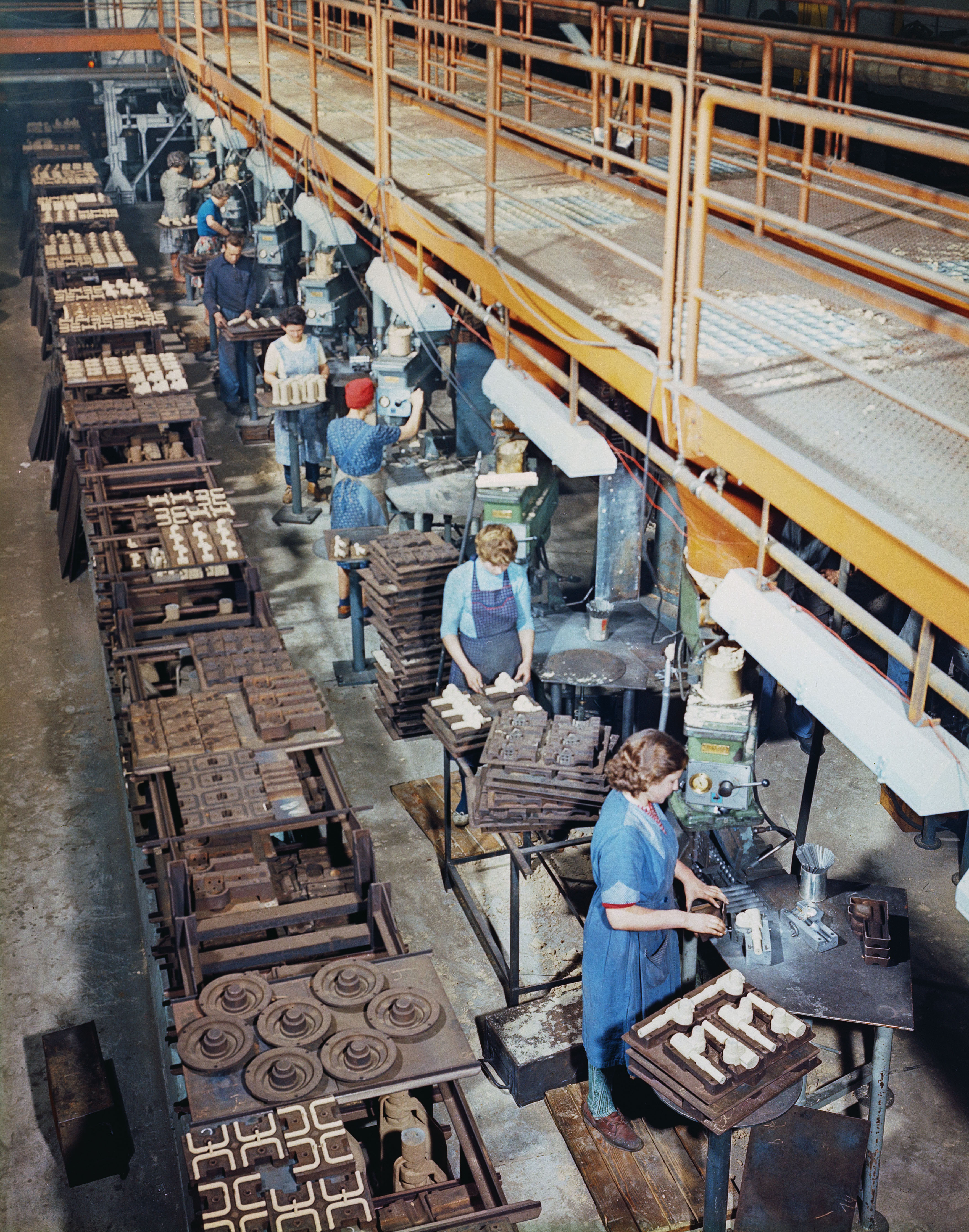 Arbeiterinnen in der Kernmacherei der neuen Giesserei im Werk Mettmann der Georg Fischer AG